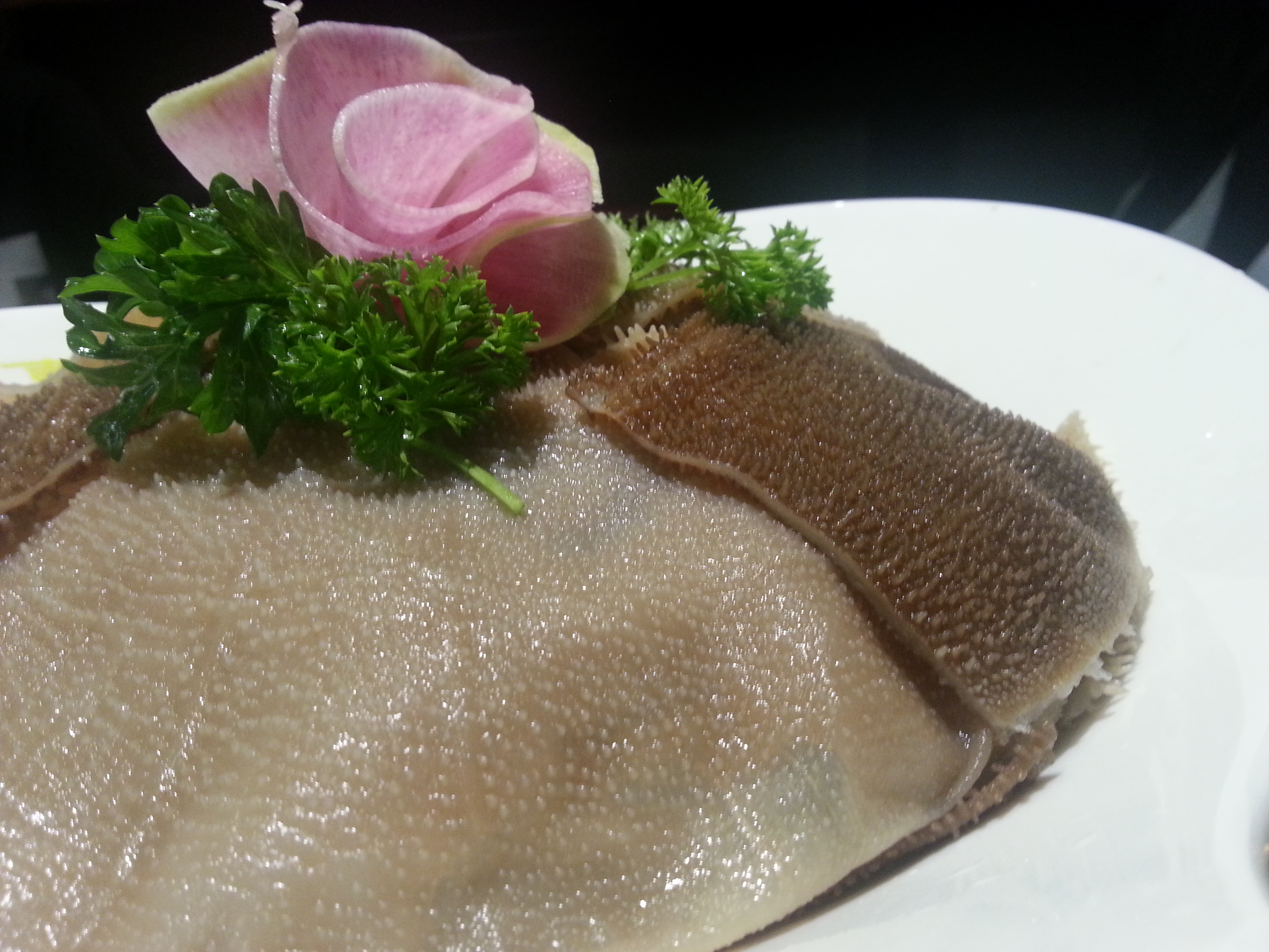 En matretter fra Karamay som utnytter av sauens indre organer.